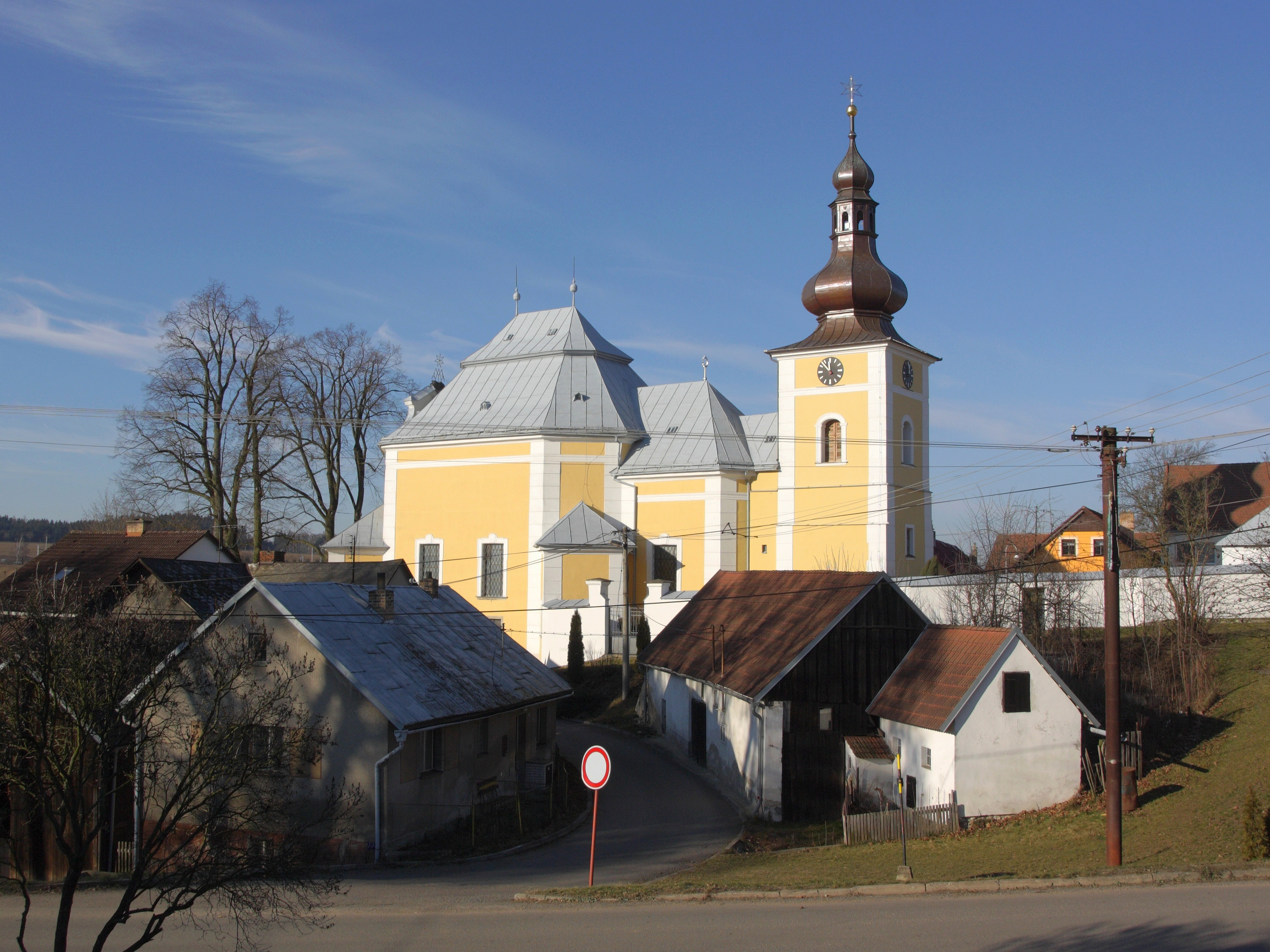 Obyčtov - kostel Navštívení Panny Marie.